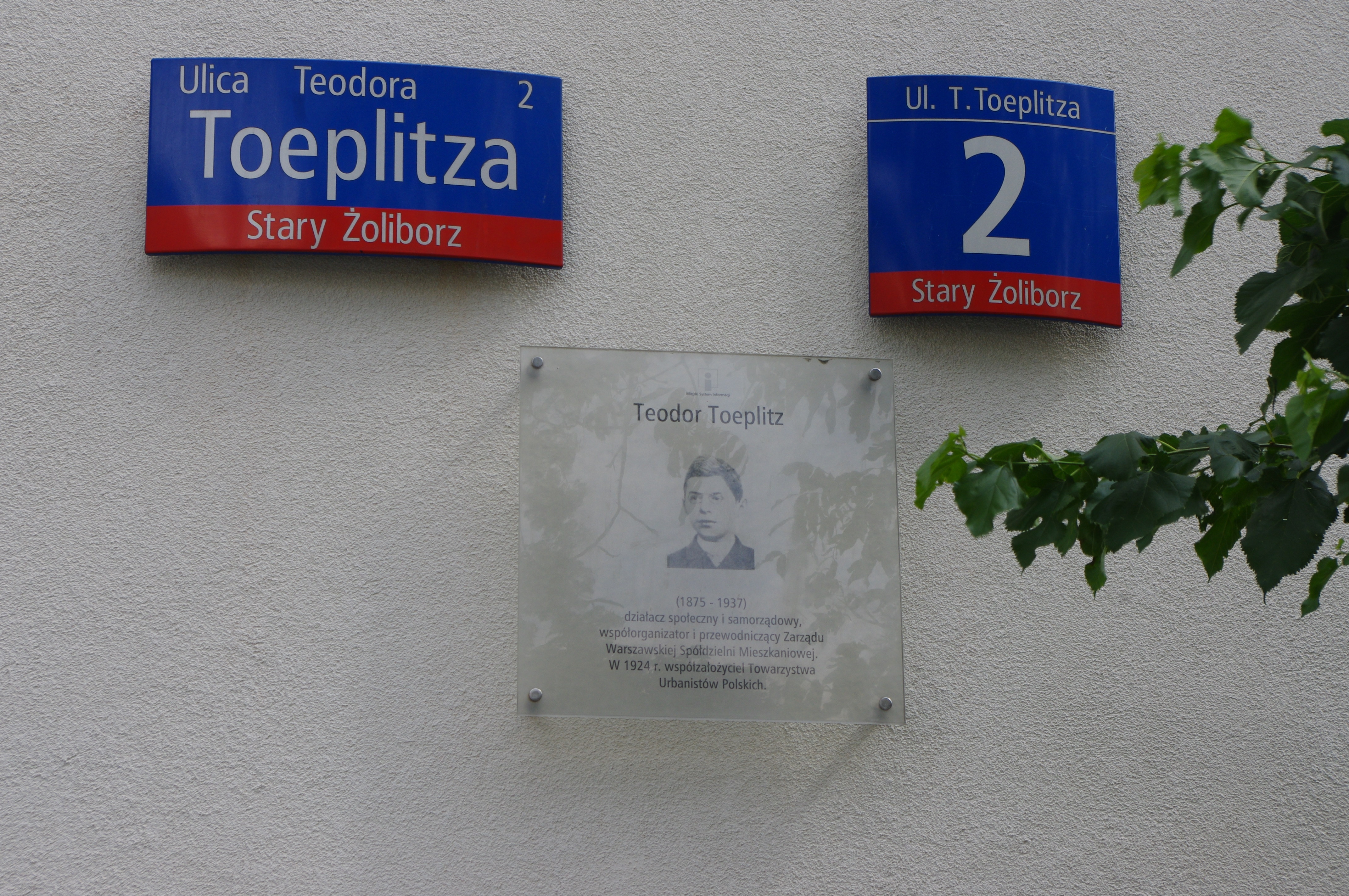 Ulica Teodora Toeplitza w Warszawie